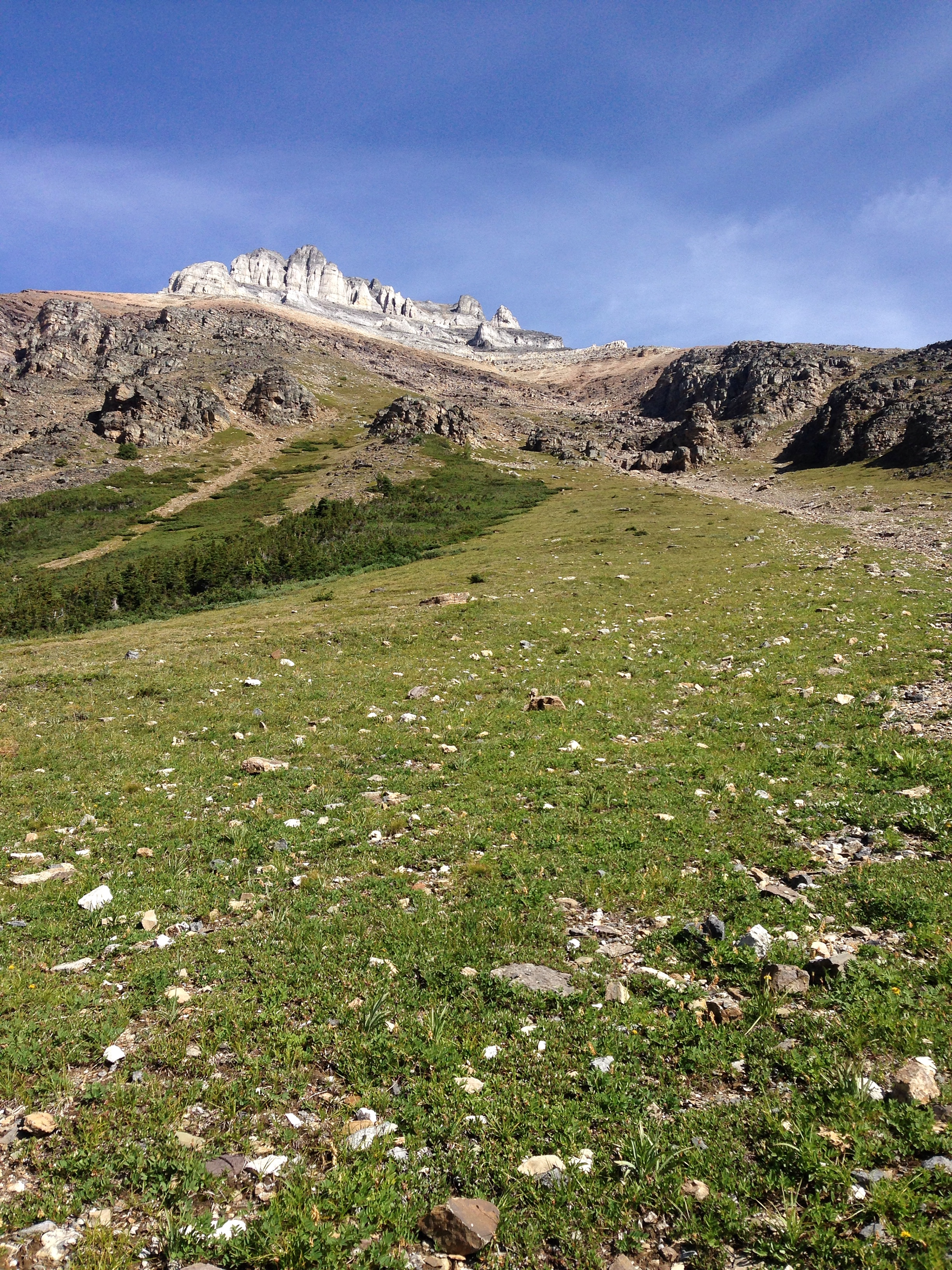 2016/366/226 Eiffel Peak